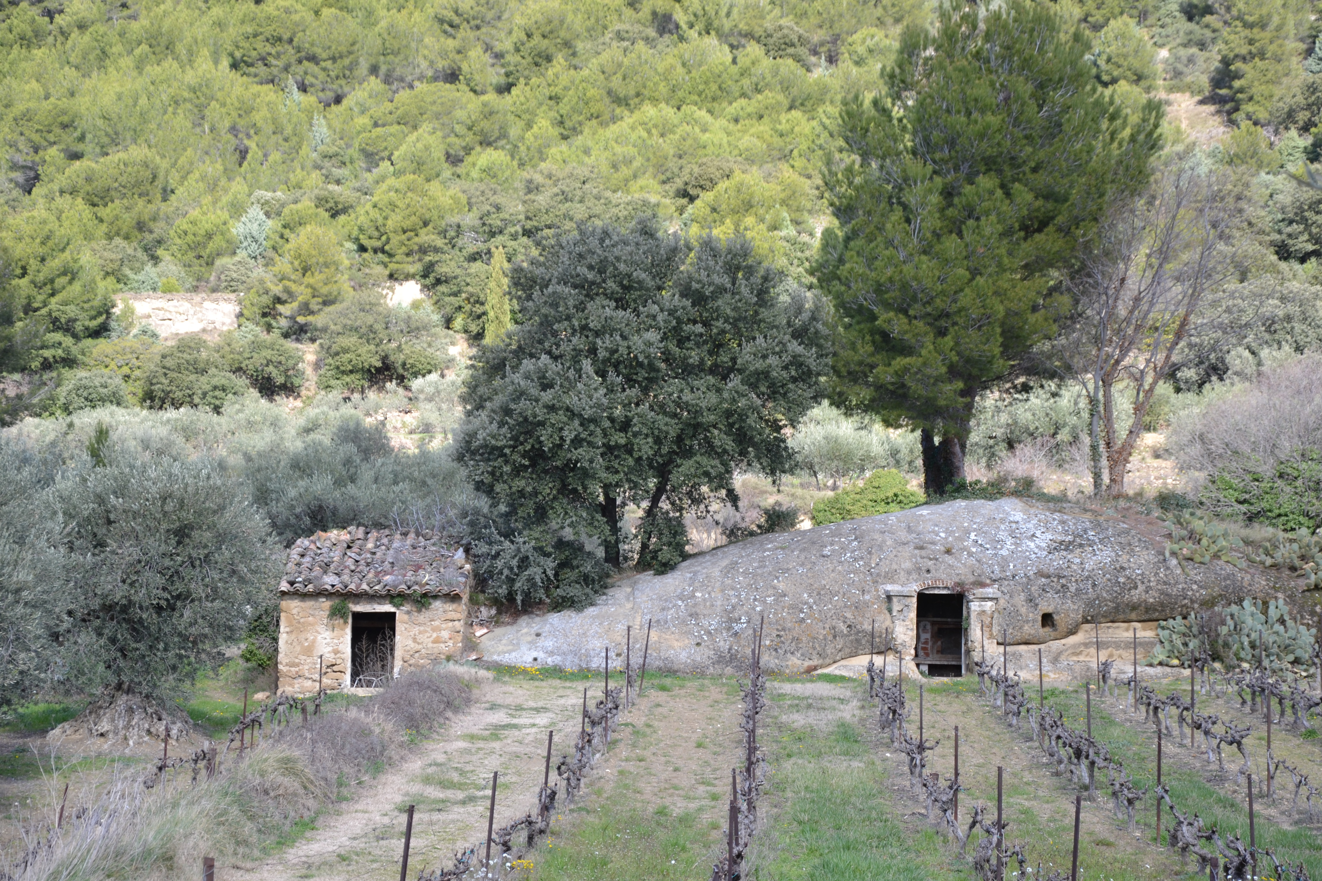 abris troglodyte et cabanon à Beaumes de Venise